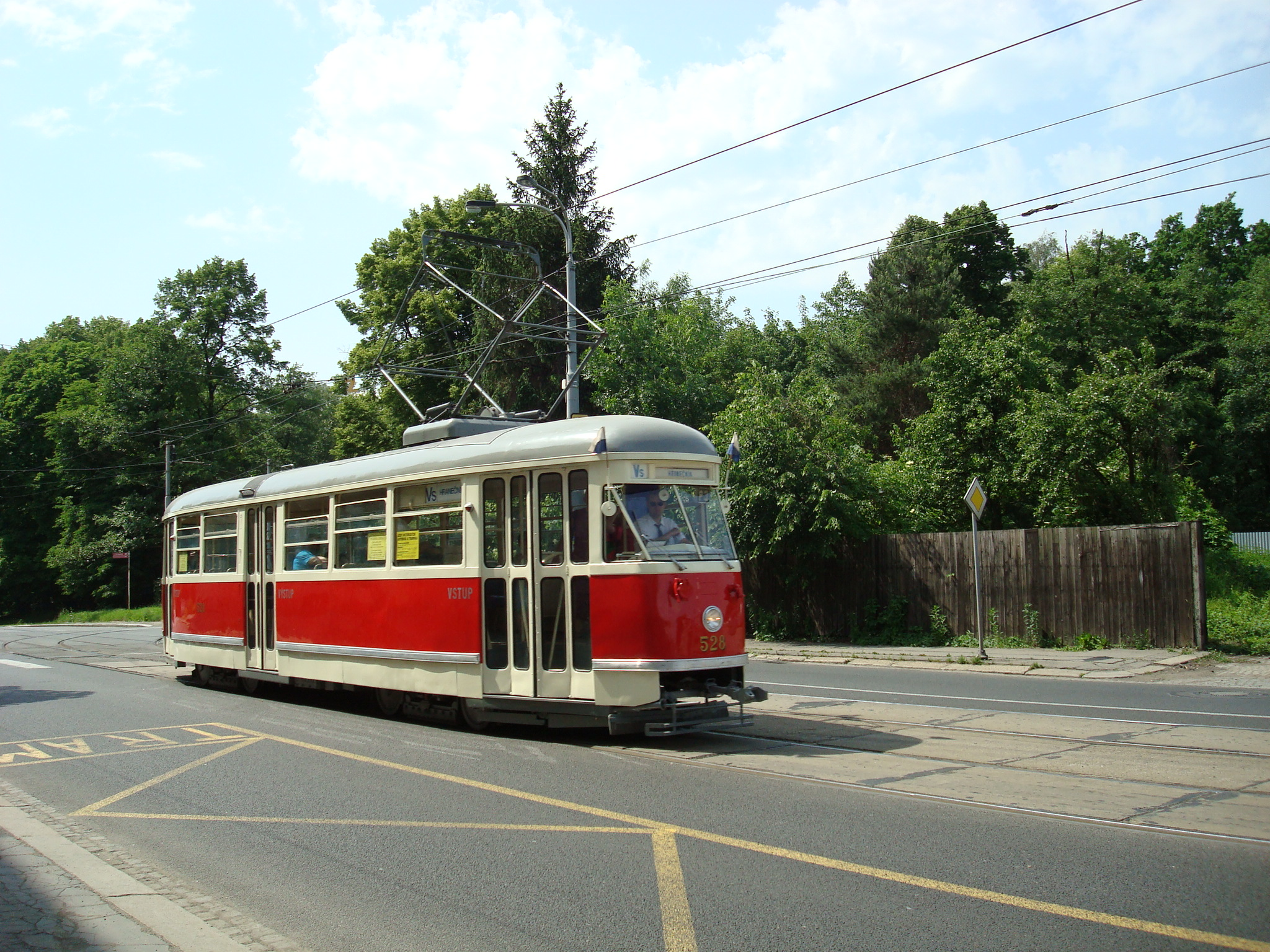 Historická tramvaj Tatra T1 v Ostravě